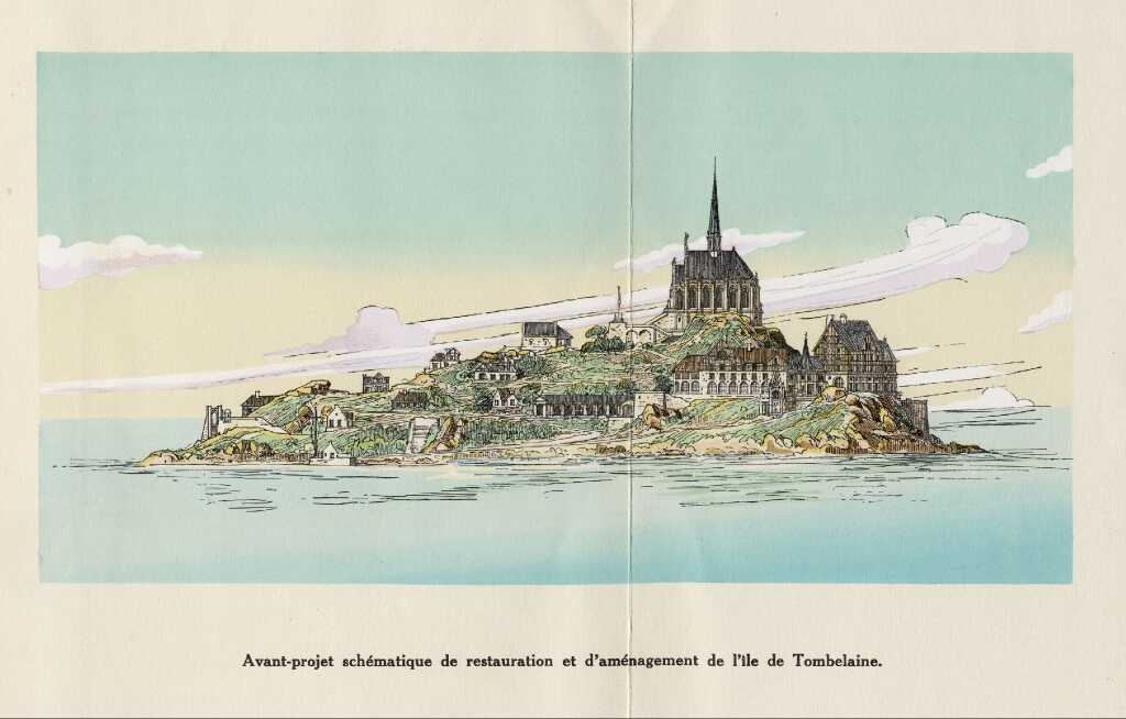 Projet d'aménagement du rocher de Tombelaine, extrait de la Notice sur la restauration et l’aménagement du rocher insulaire de Tombelaine. Archives départementale de la Manche (cl. A. Poirier, Bib C 781)